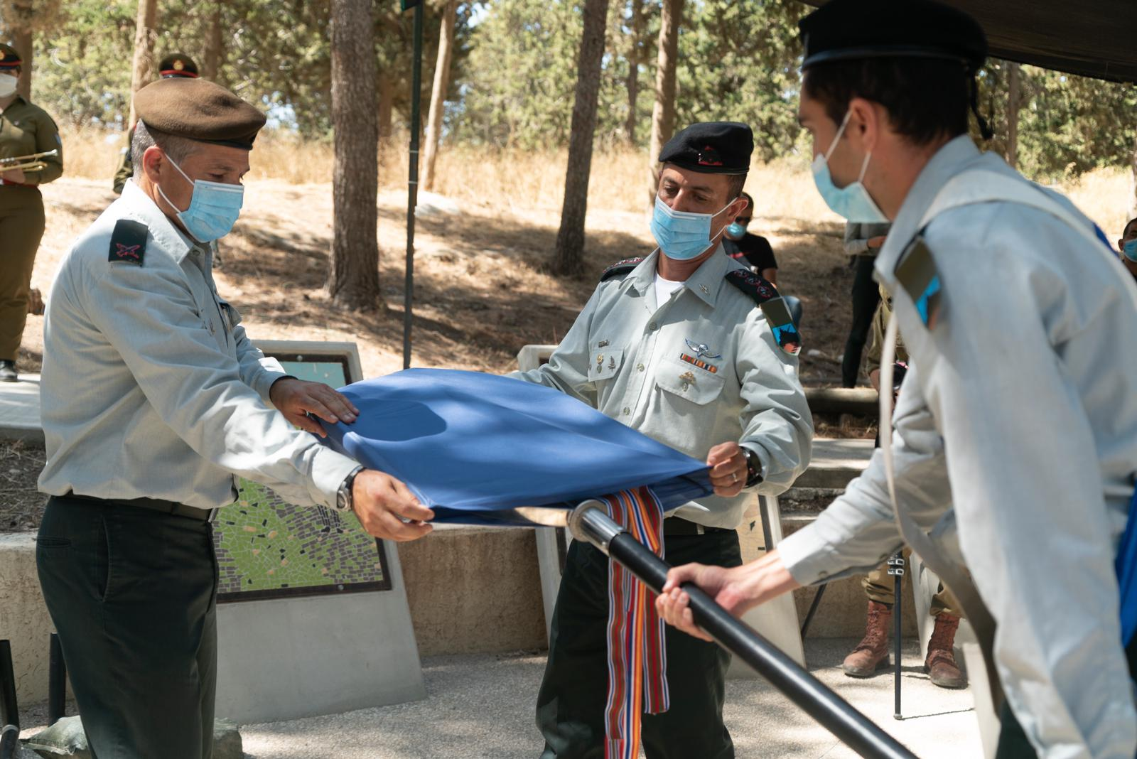 היום בבוקר (רביעי) התקיים טקס לסגירת עוצבת "מרכבות הפלדה", באתר "יד לשריון" בלטרון, בראשות מפקד זרוע היבשה, אלוף יואל סטריק, מפקד עוצבת "עידן", תת-אלוף דוד זיני, קצין שריון ראשי, תת-אלוף אוהד , אלוף-משנה רונן תמים, נג'מה, מפקד עוצבת "מרכבות הפלדה" ובהשתתפות מפקדי העוצבה בעבר ובהווה.